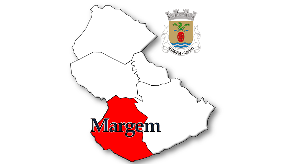 Evolução da População